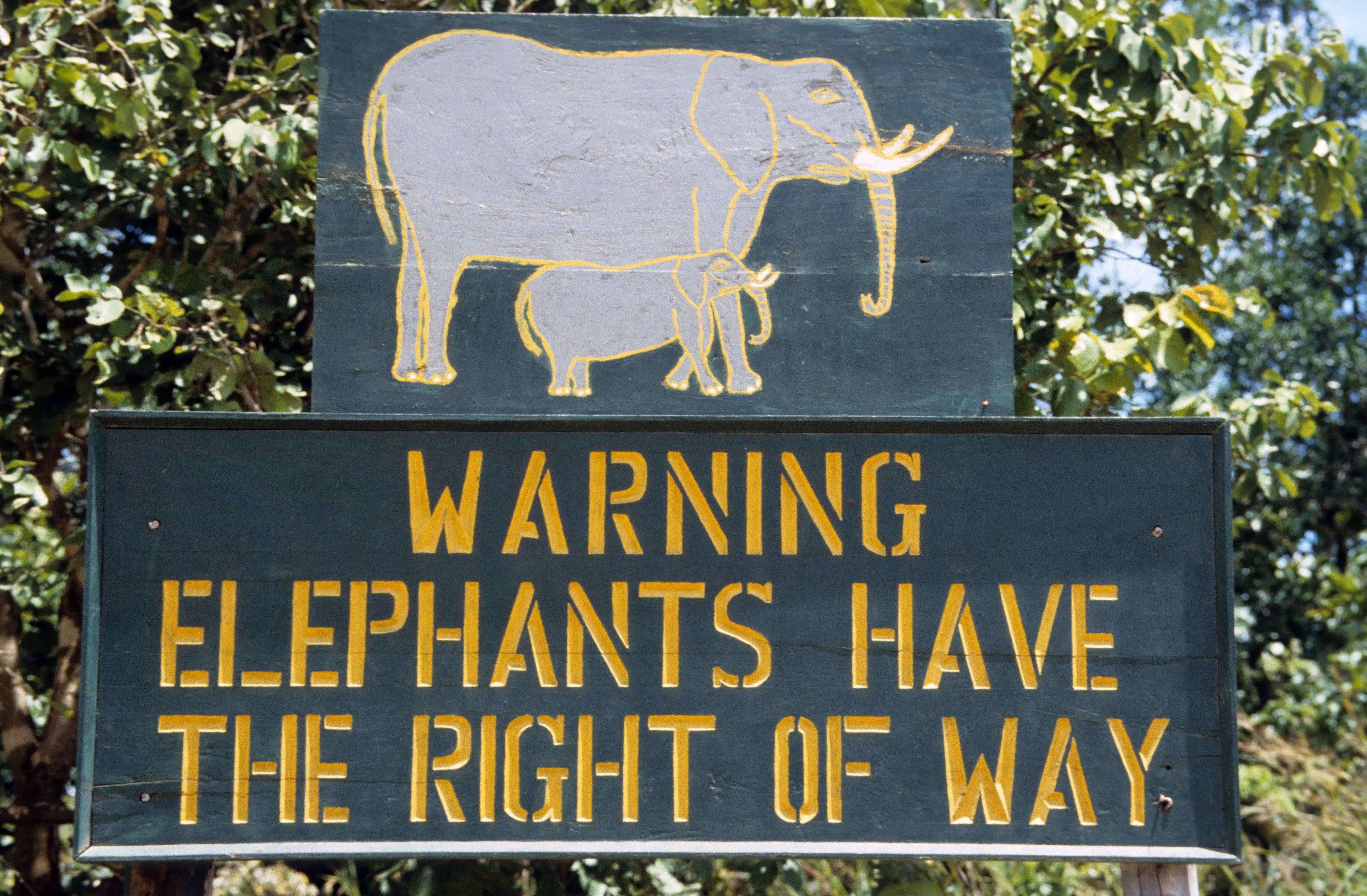 Sign in Kasungu National Park